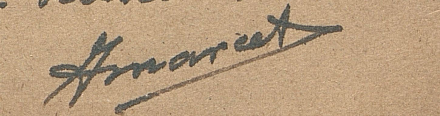 Signature autographe d'Arthur Marcet, compositeur, directeur et fondateur de l'Orfeó Canigó de Perpignan